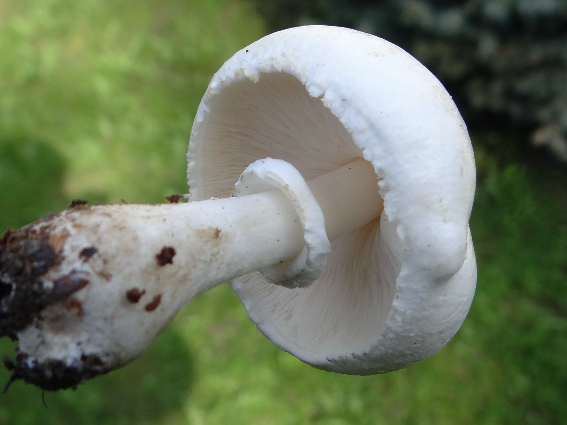 Leucoagaricus leucothites (location: Poland, Trzciana (województwo małopolskie)